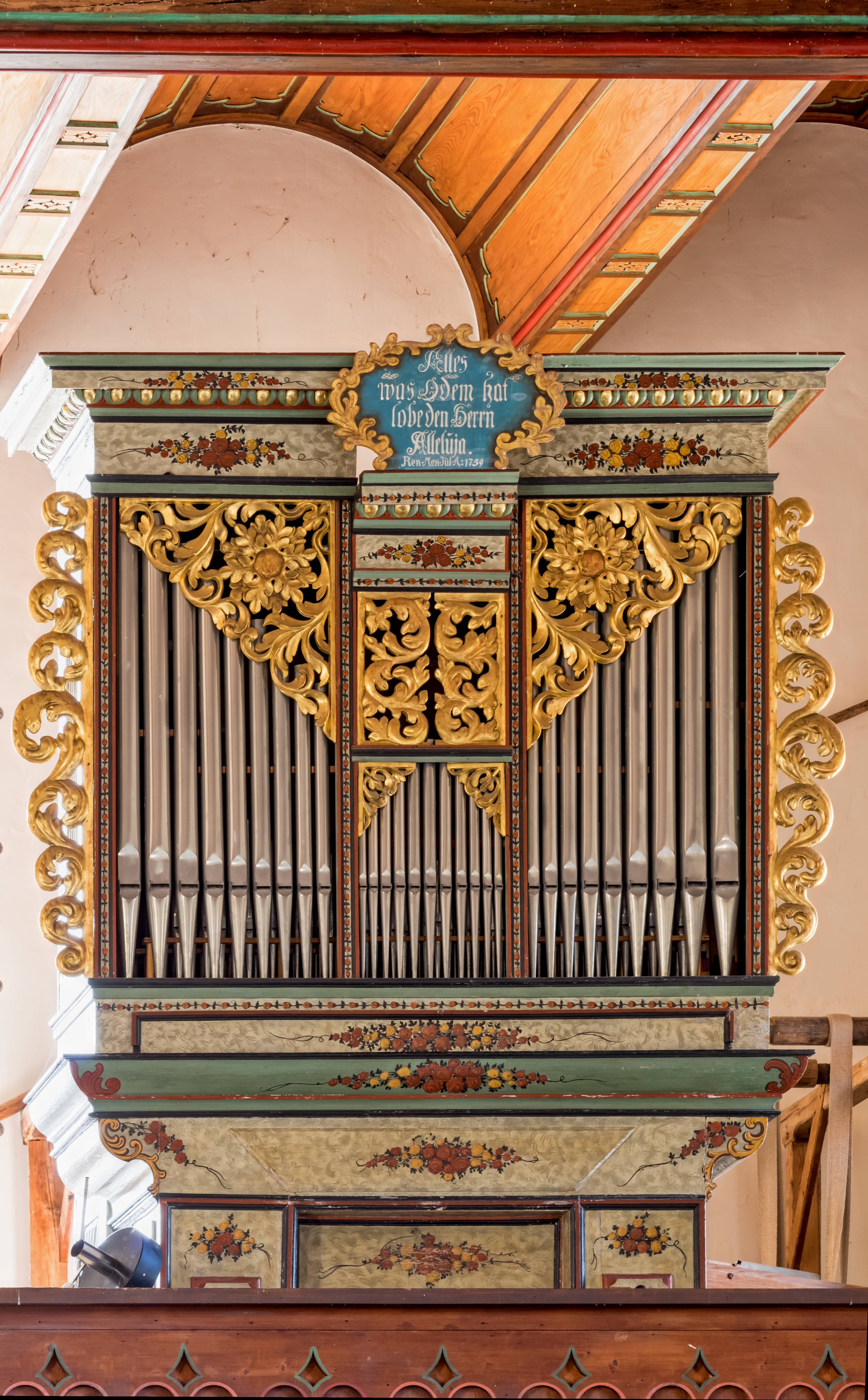 St. Aegidien in St. Ilgen einem Teilort von Laufen Die historische Orgel, mit Detailaufnahmen.